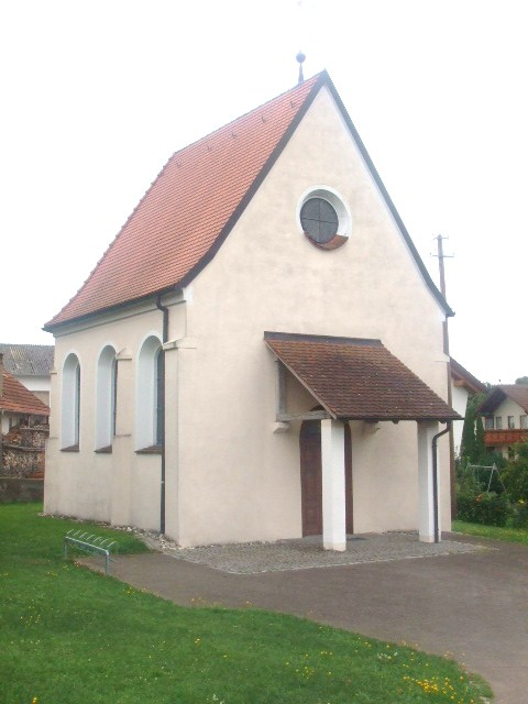 Kapelle Maria Schnee, Unterstadion, Alb-Donau-Kreis